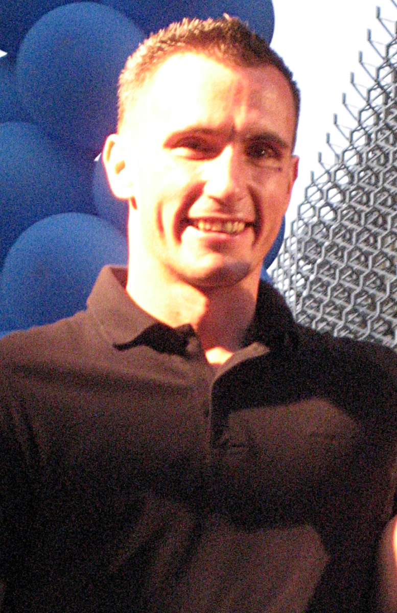 Marijo Šivolija-Jelica na riječkom Korzu